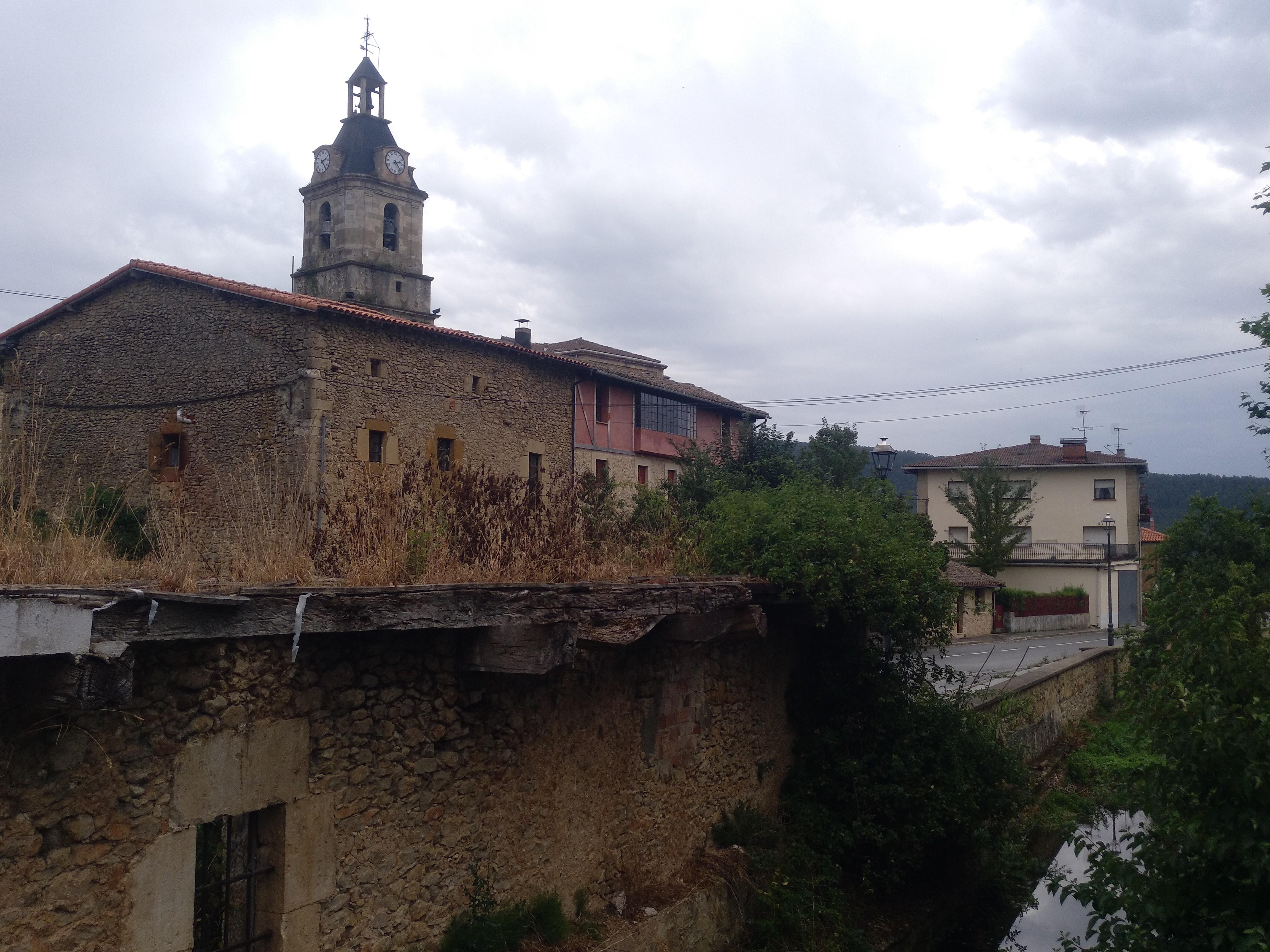 San Bizente eliza, Bóvedan (Gaubea)